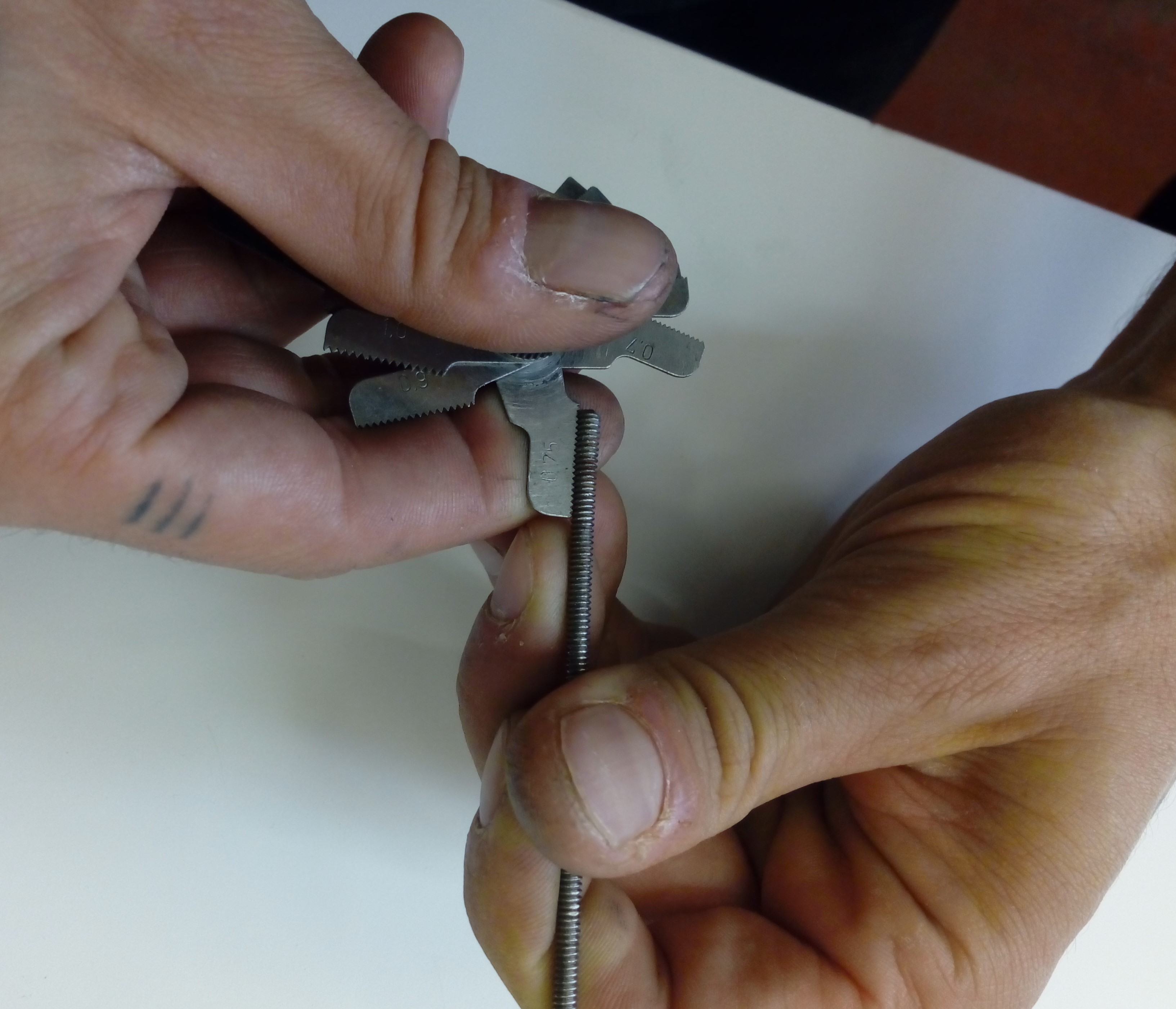 Les griffes permettent de déterminer le pas des filets (hauteur et profondeur de la spirale incisée sur la tige)